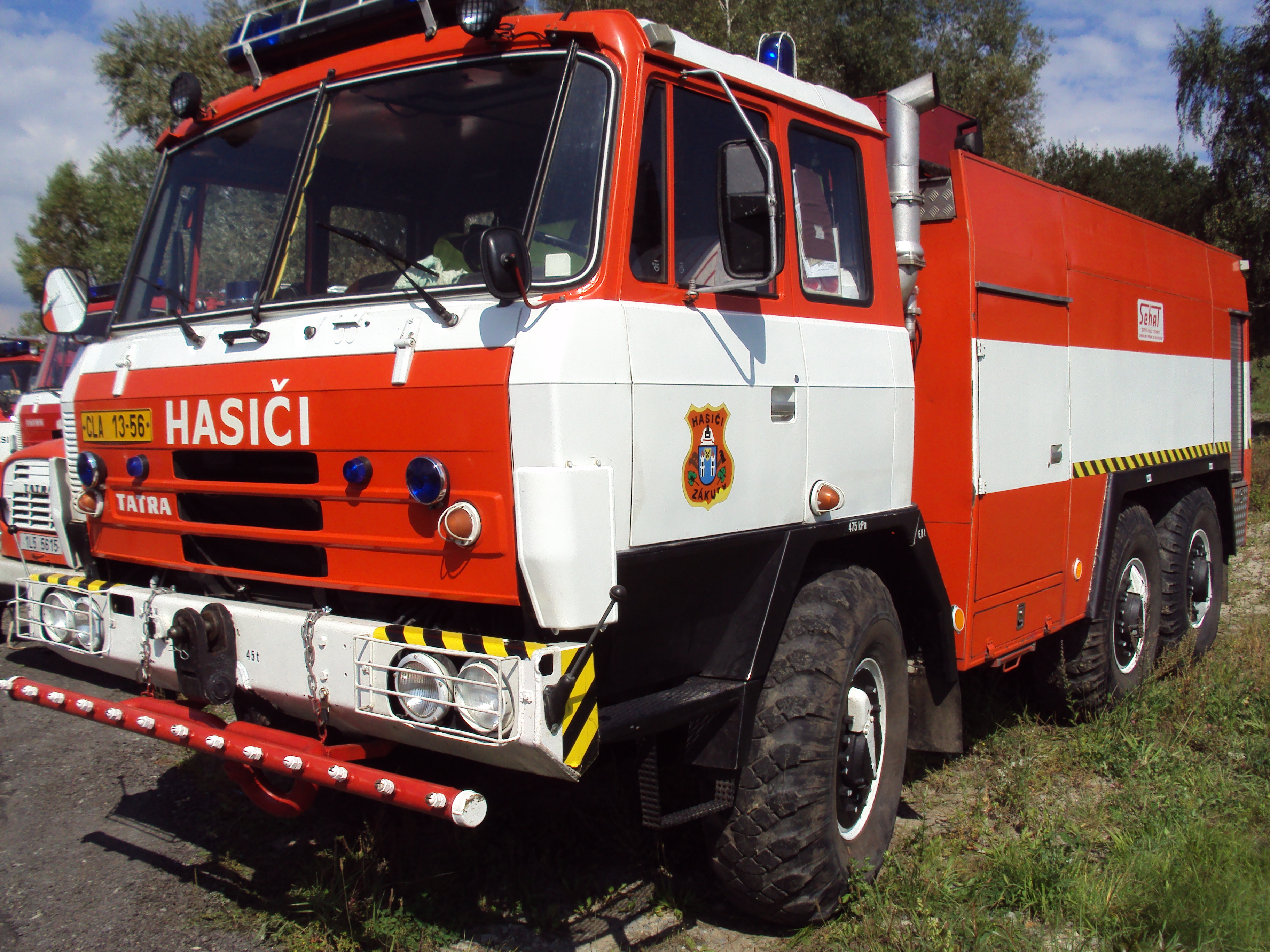 Hasičské auto CAS 24 Tatra 815 VVN 6x6 patřící SDH Zákupy